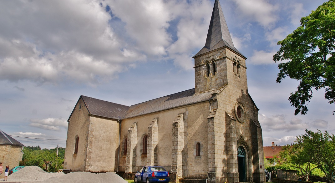 église Ste Radegonde